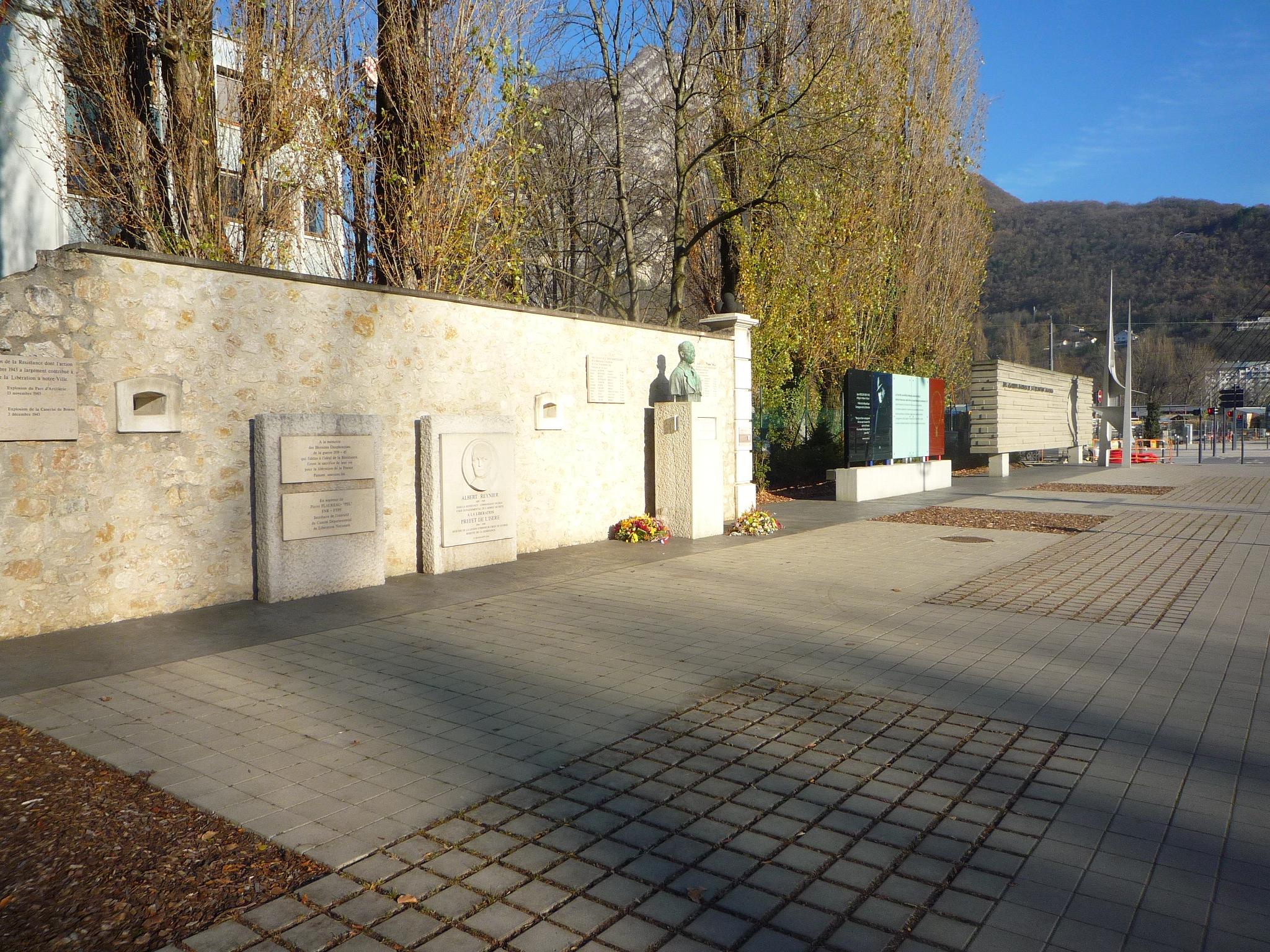 Mur de la Résistance, inauguré en 2002 - Presqu'île scientifique de Grenoble.